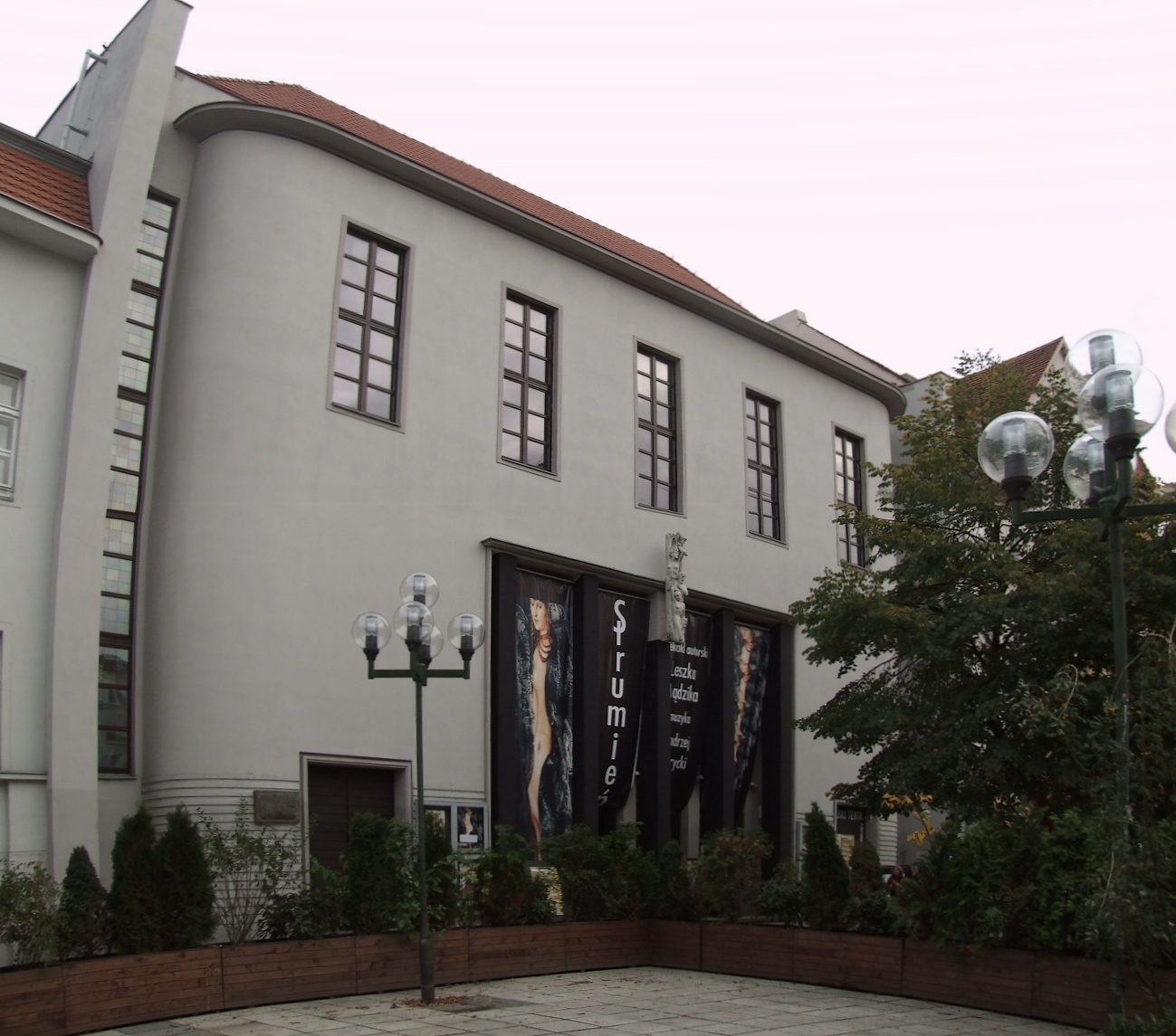 Zielona Góra, al. Niepodległości 3/5 - Lubuski Teatr im. L. Kruczkowskiego Author: Mohylek 16:22, 2 November 2006 (UTC)